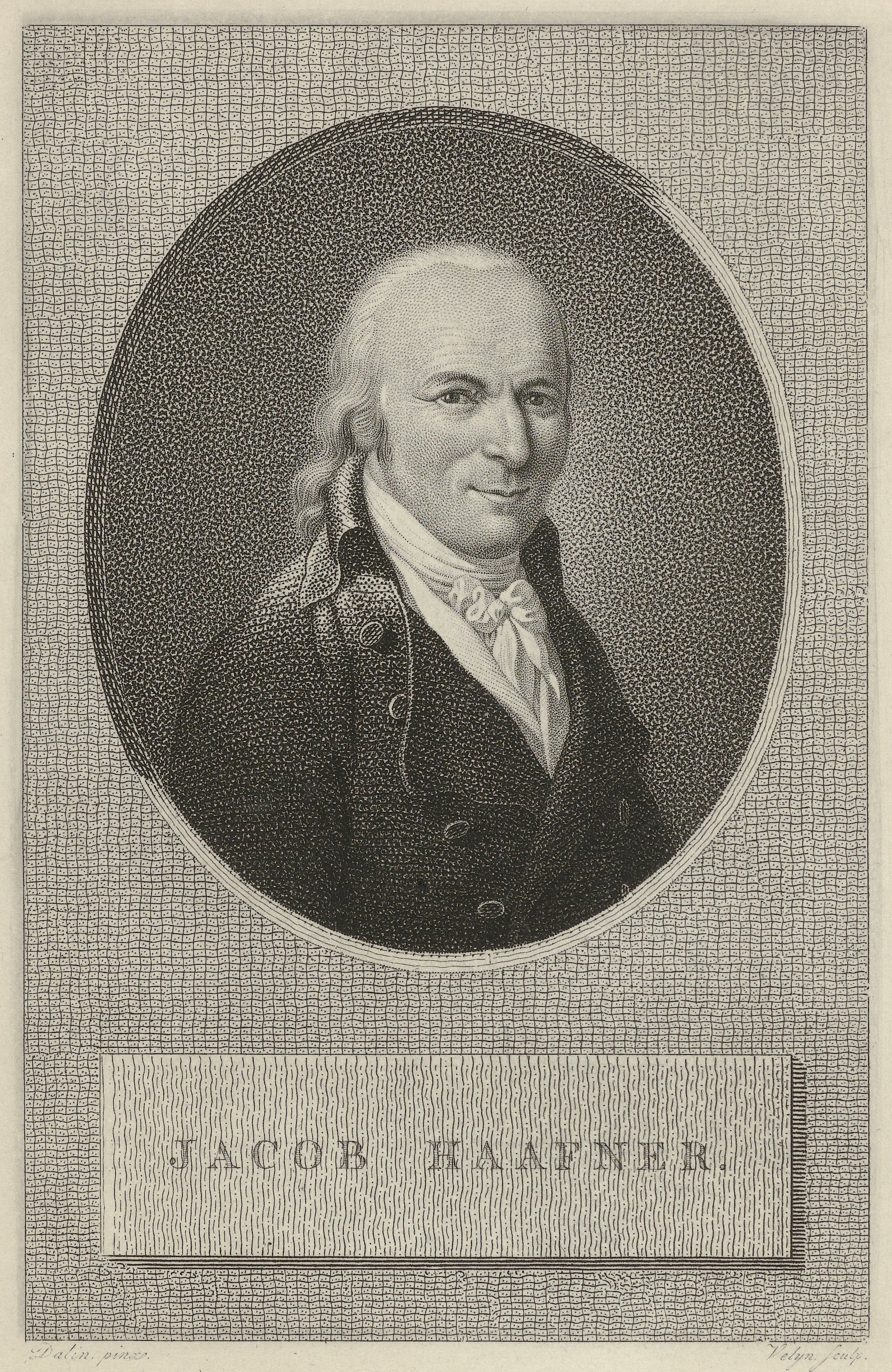 Jacob Haafner in 1805